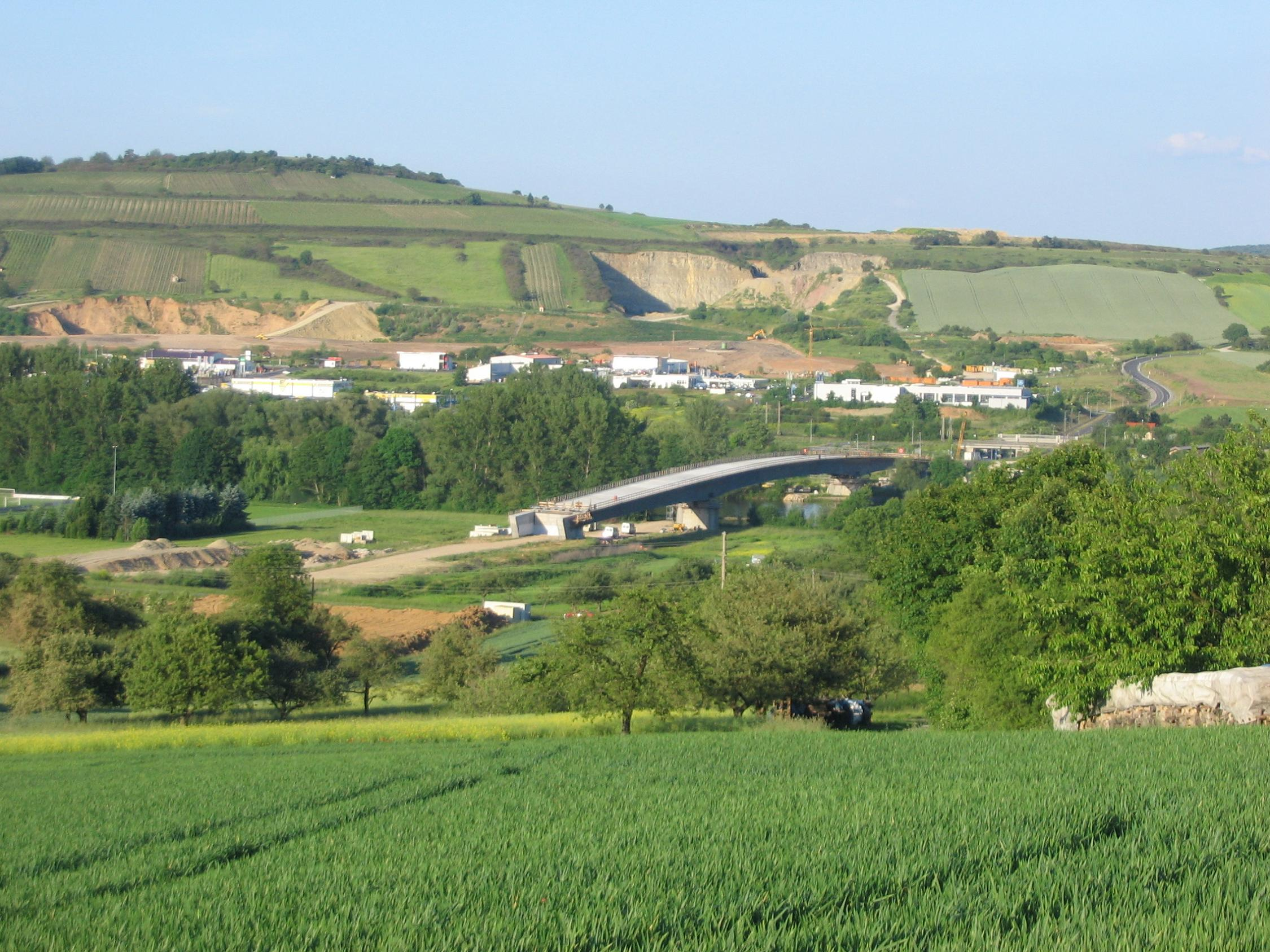 Karolingerbrücke